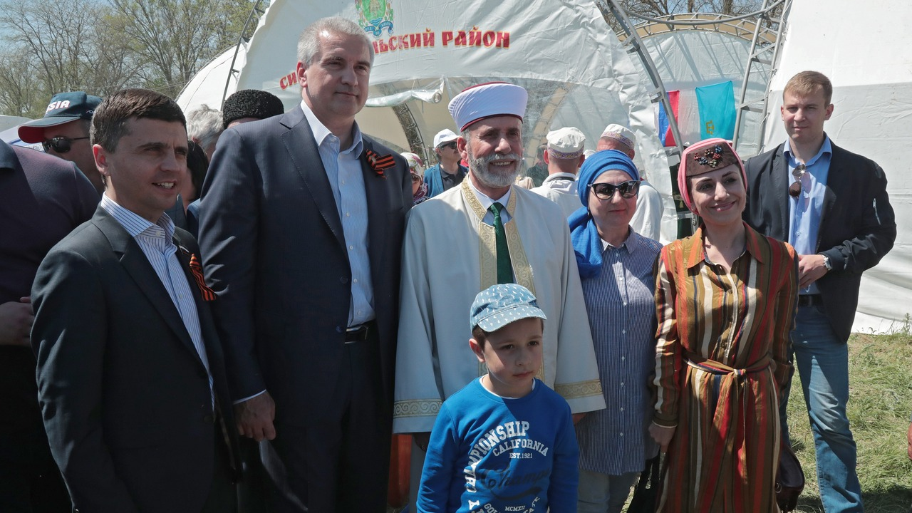 Празднование Хыдырлеза в Бахчисарайском районе Республики Крым